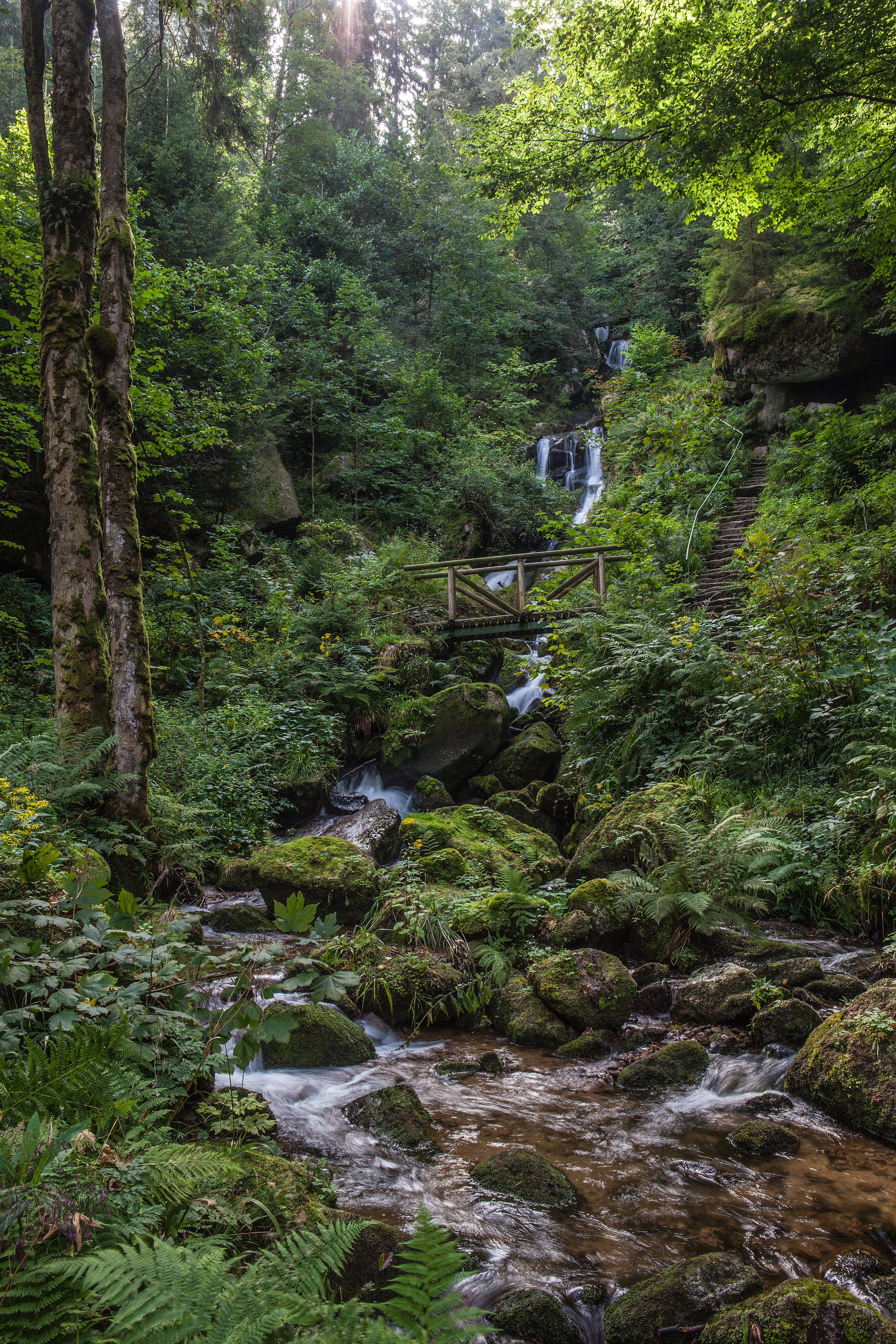 Gertelbach-Wasserfälle im Bühlertal